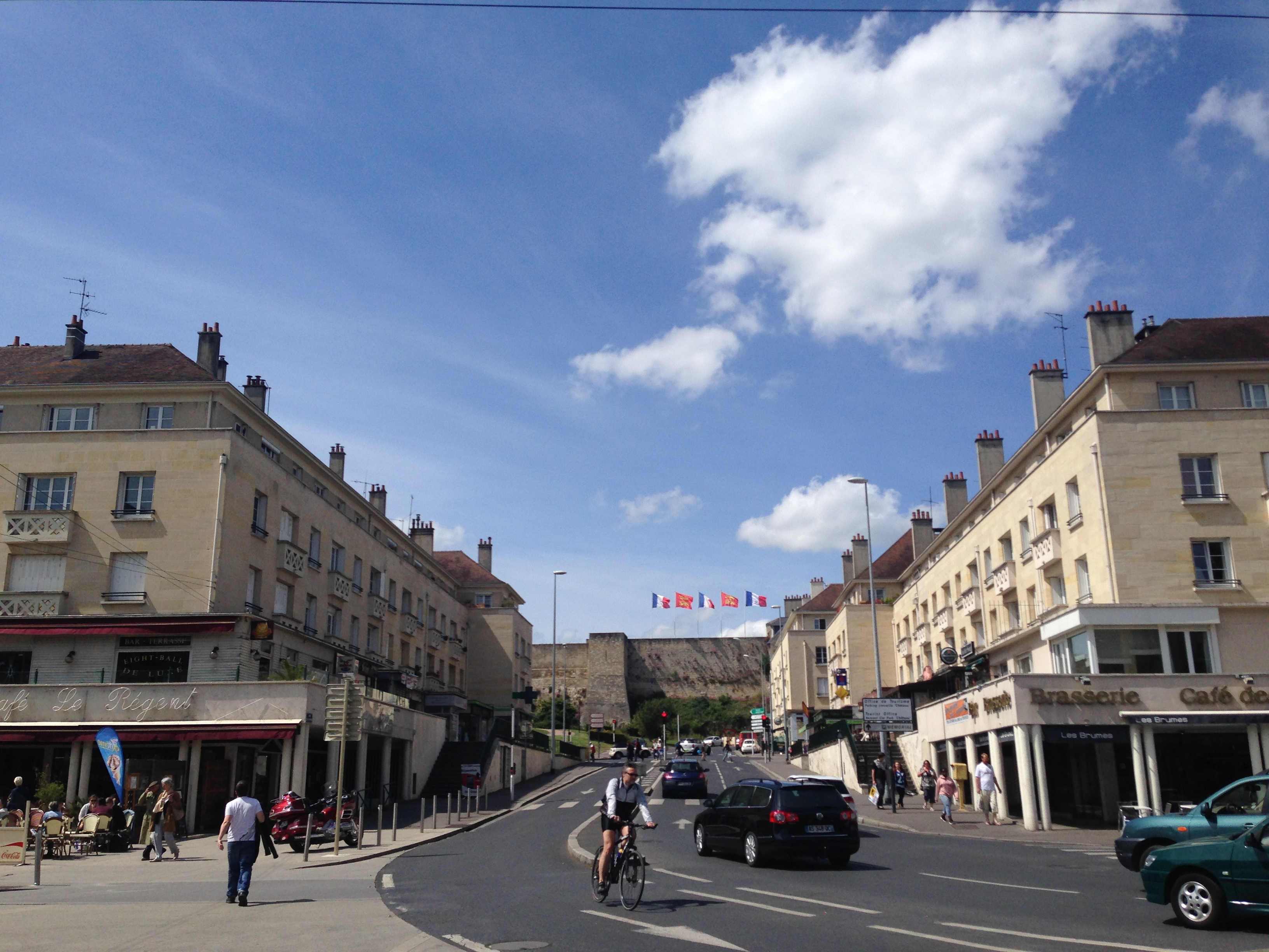 avenue de Libération et le château de Caen au fond